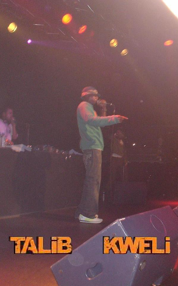 Talib Kweli var et af hovednavnene til hip-hop arrangementet Århus Took It, 2005.